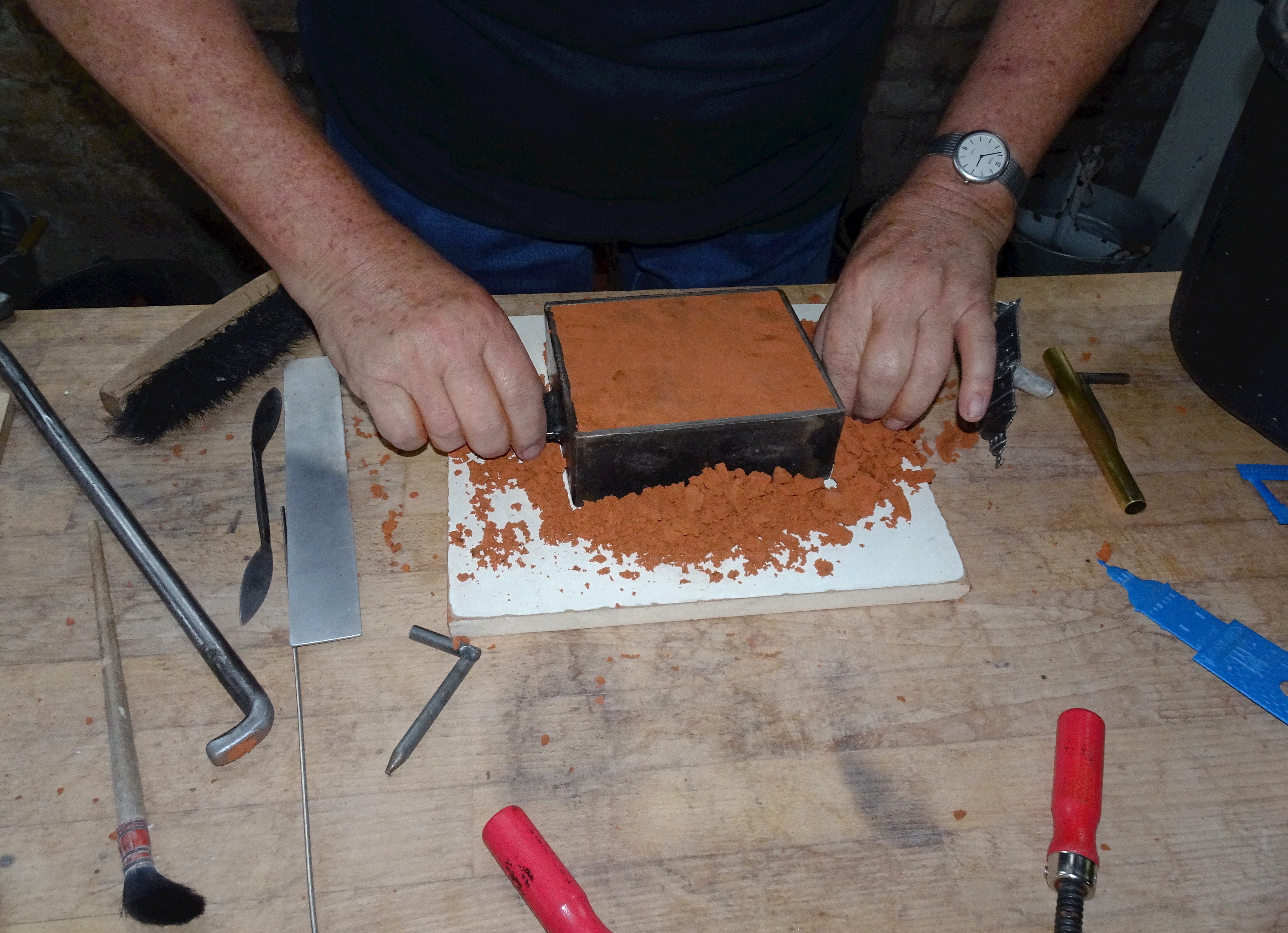 Alte Metallgiesserei Kiel, Vorführung für einen Guss